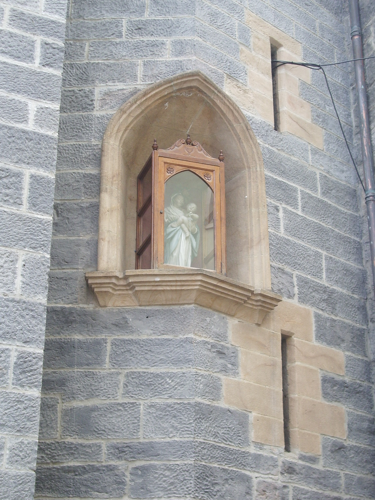 Nuestra Señora la Virgen del Rosario, a la que se dedican las fiestas de Maritxu Kajoi, en Arrasate-Mondragón